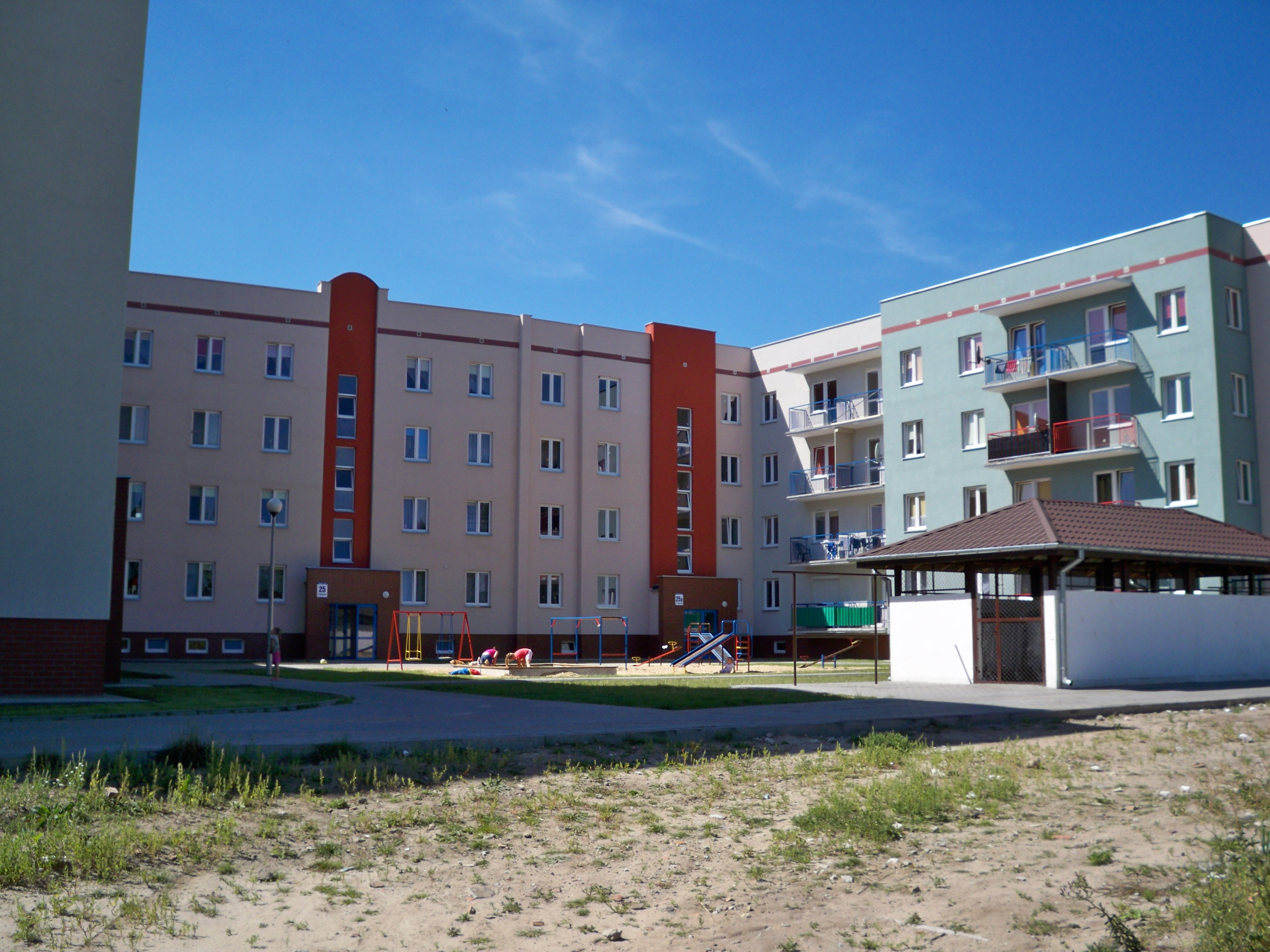 Nowe bloki przy Celulozowej 25 (2009 r.)